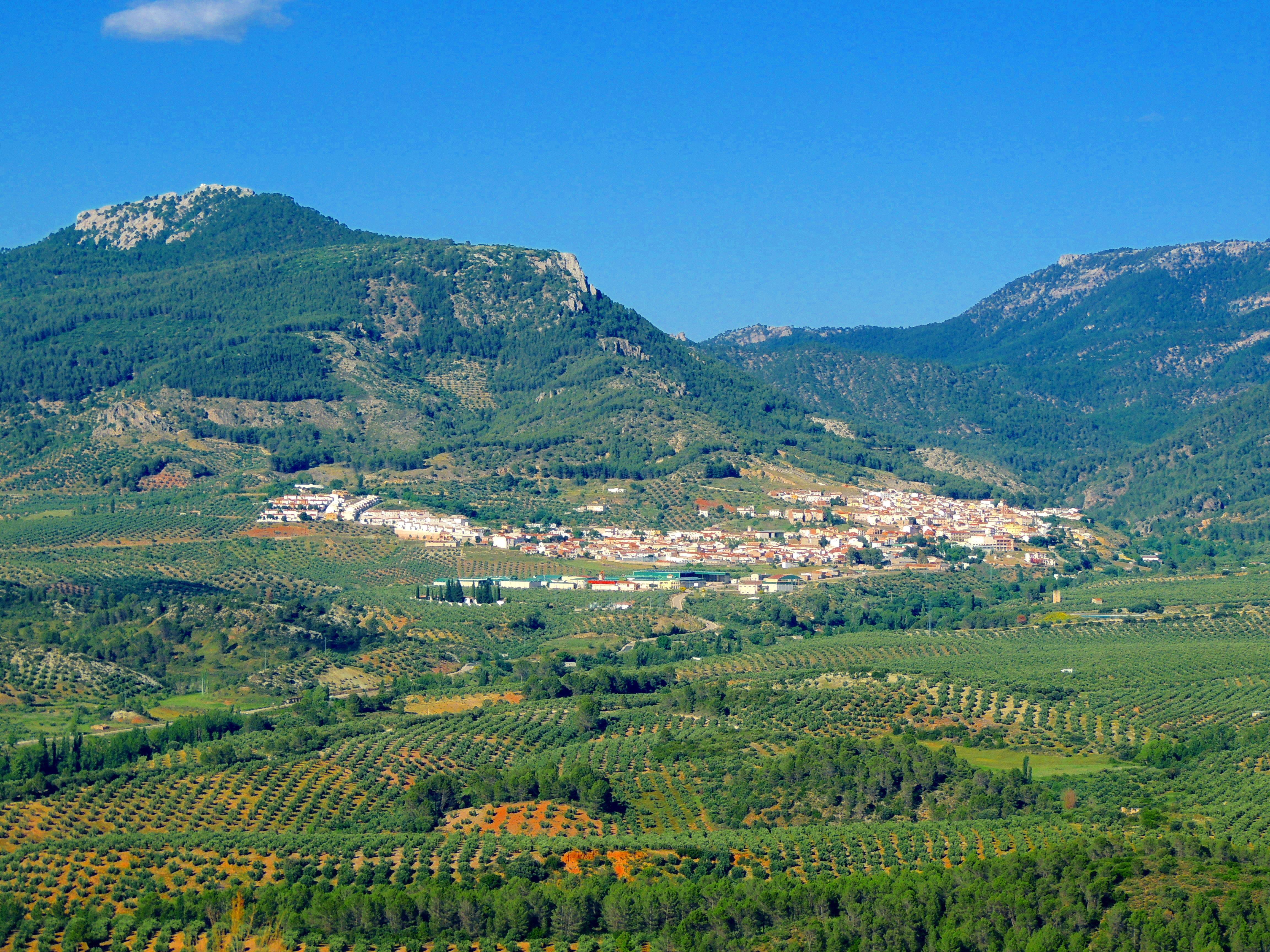 Vista general de Orcera